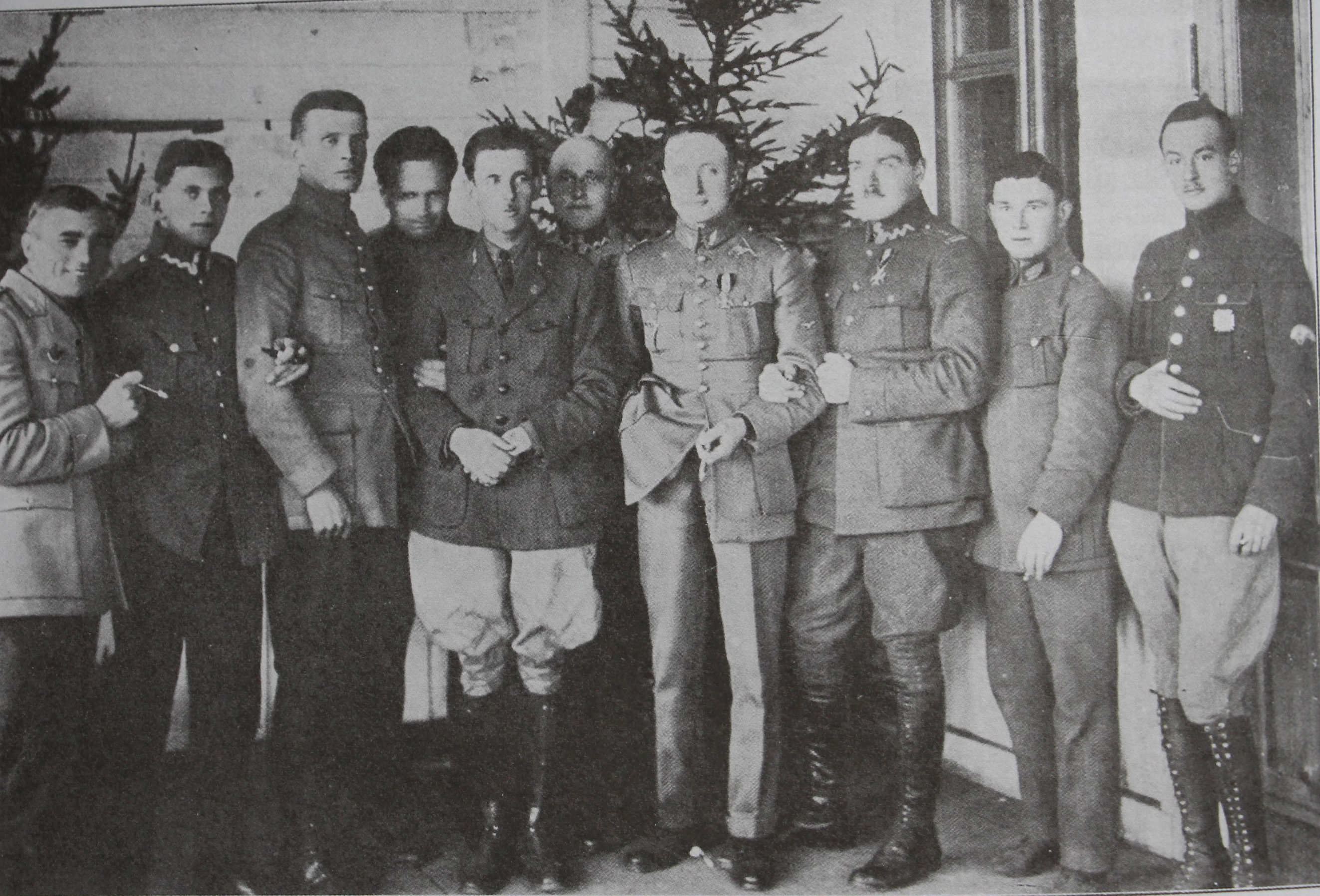 Oficerowie 10-ej eskadry wywiadowczej po dekoracji orderem Virtuti Militari, wraz z szefem lotnictwa 4-ej Armii mjr Jerzym Kossowskim; październik 1920